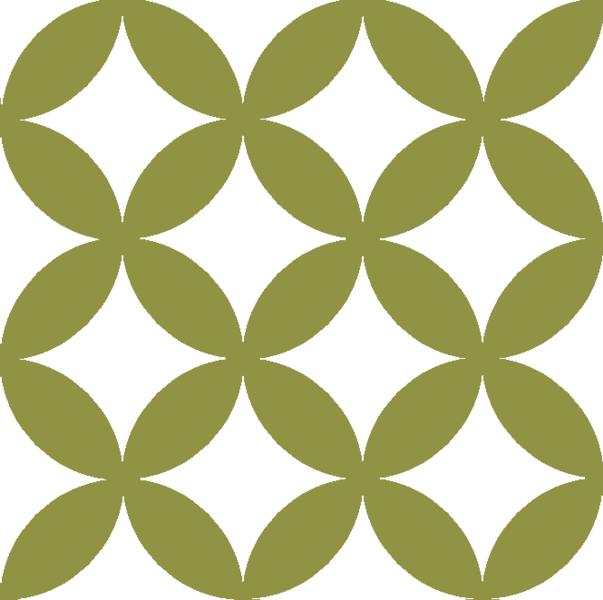 日本の伝統文様である「七宝つなぎ」の一例。